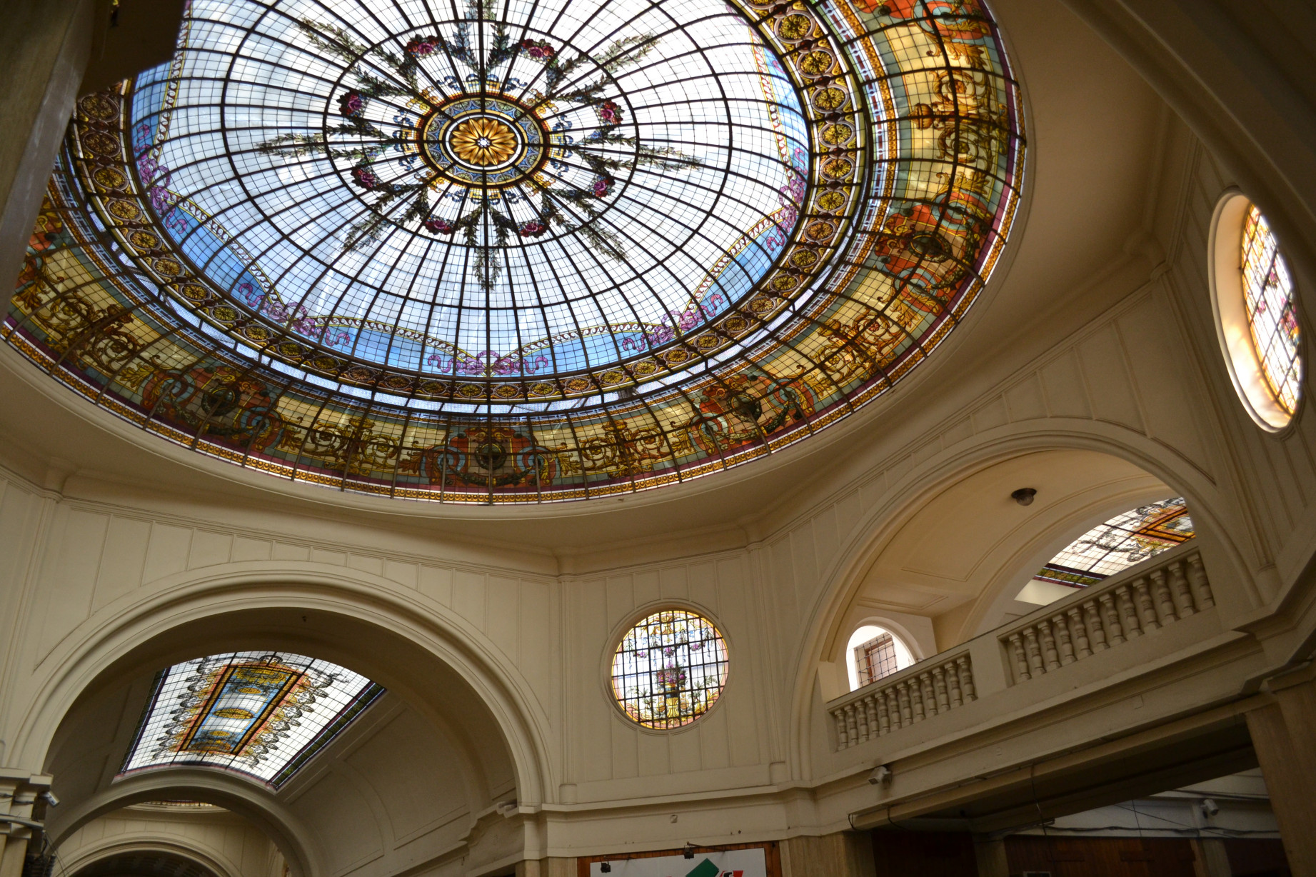 Pasaje San Martín. Galería Comercial. Ubicada en Av. San Martín 1152, ciudad de Mendoza. - Monumento Histórico Provincial, ID M097.